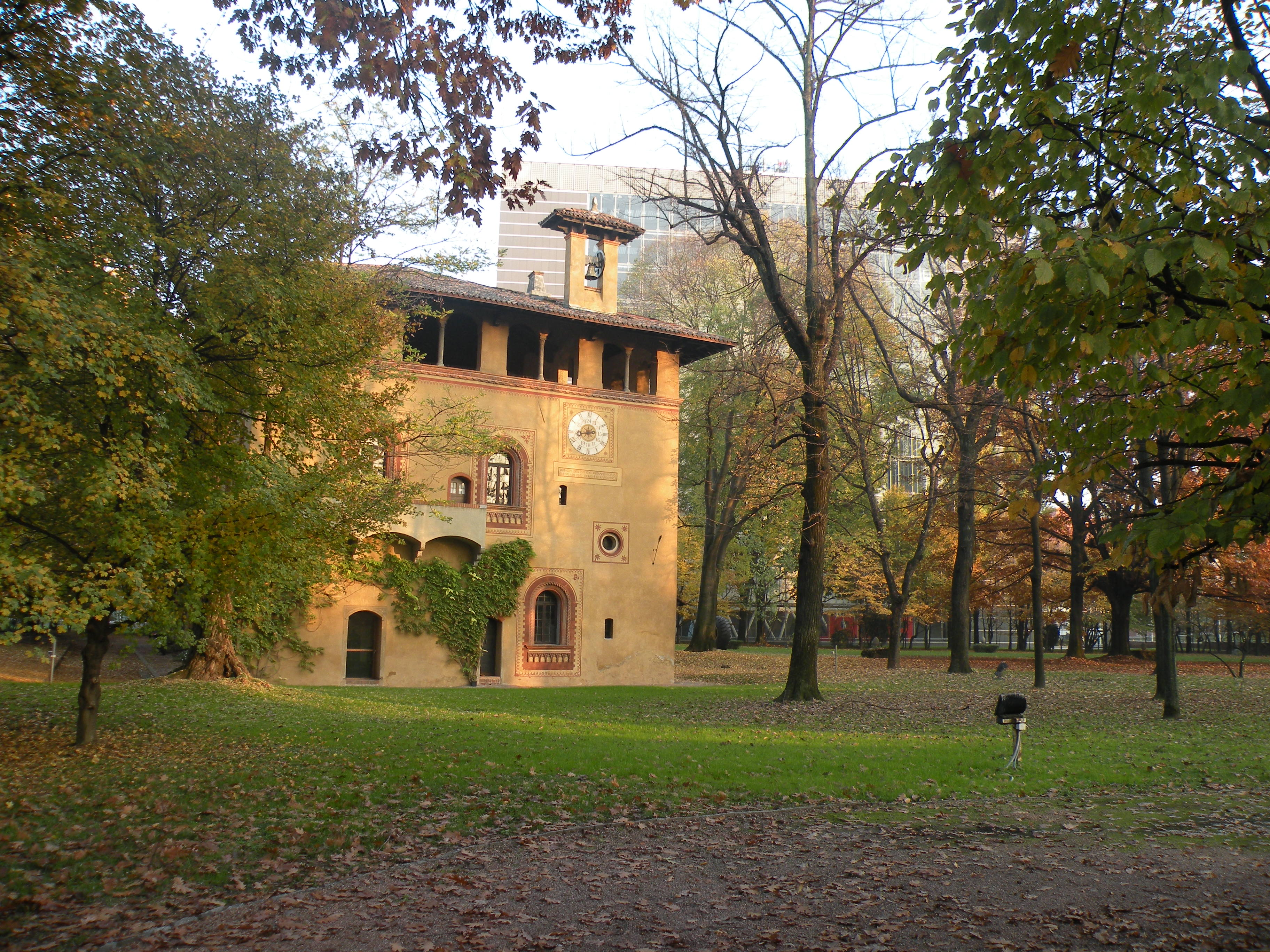 Foto della Villa Bicocca degli Arcimboldi, edificio caratteristico del quartiere Biocca di Milano